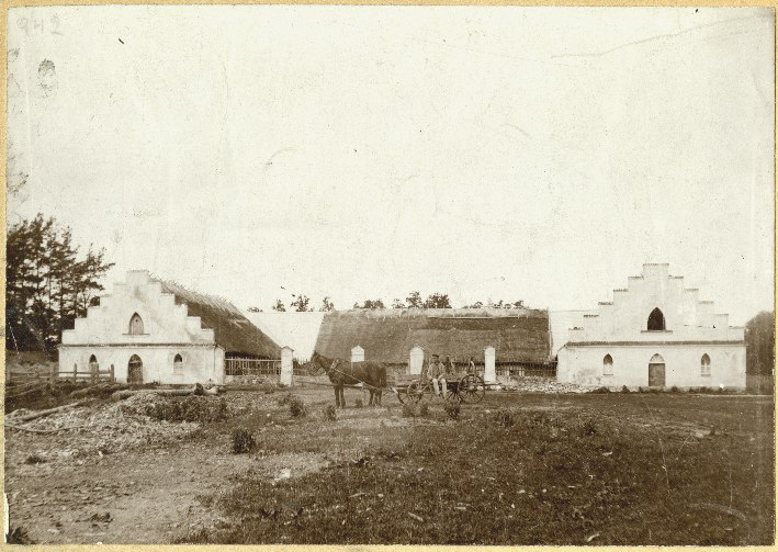 Гарнастаевічы. Сядзіба (XX)Беларуская (тарашкевіца): Гарнастаевічы (Harnastajevičy). Сядзіба